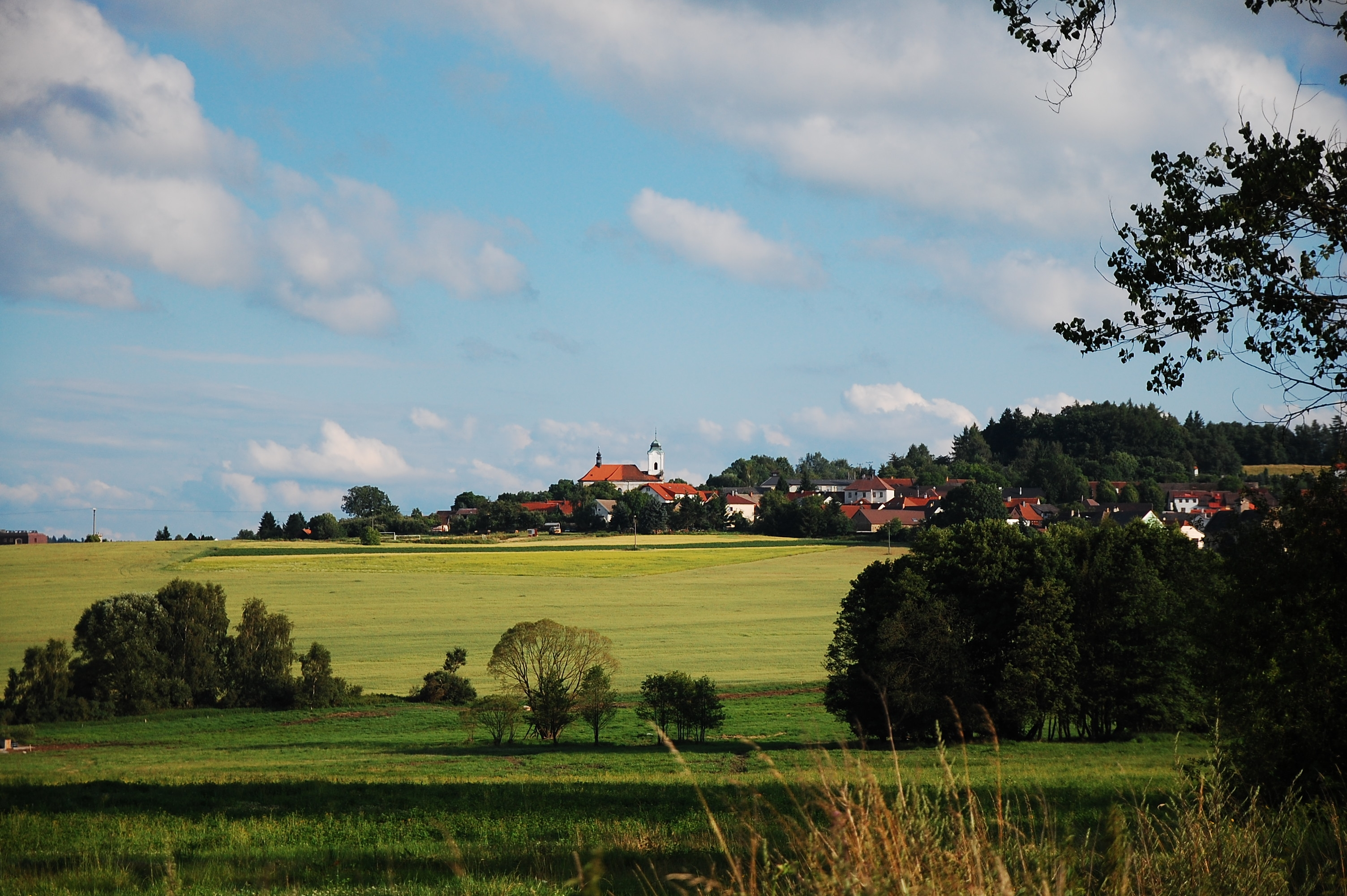 Kostel sv. Blažeje (Plánice), Kostelní, Plánice